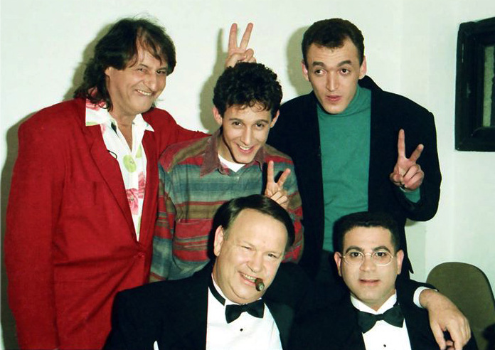 ג'וליאן שגרן איתי שגב שלום אסייג יגאל שילון ואלי יצפאן